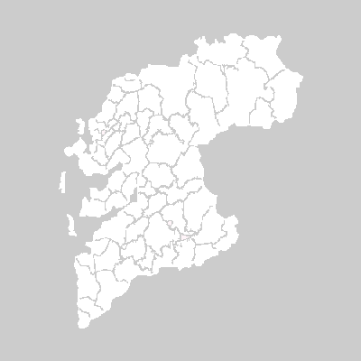 Landkarte der Provinz Pontevedra mit Gemeindebezirken